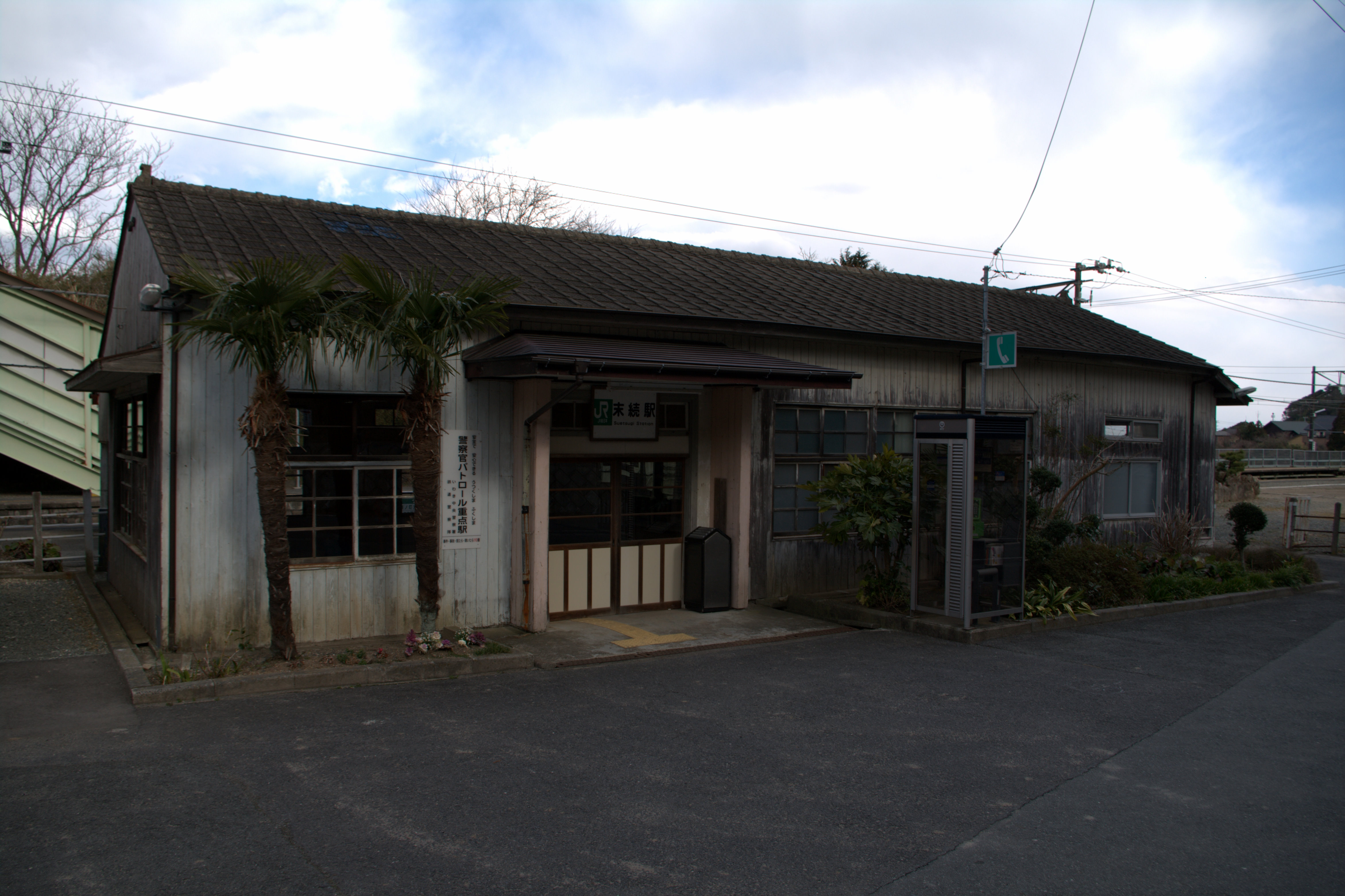 JR末続駅、2011年4月4日